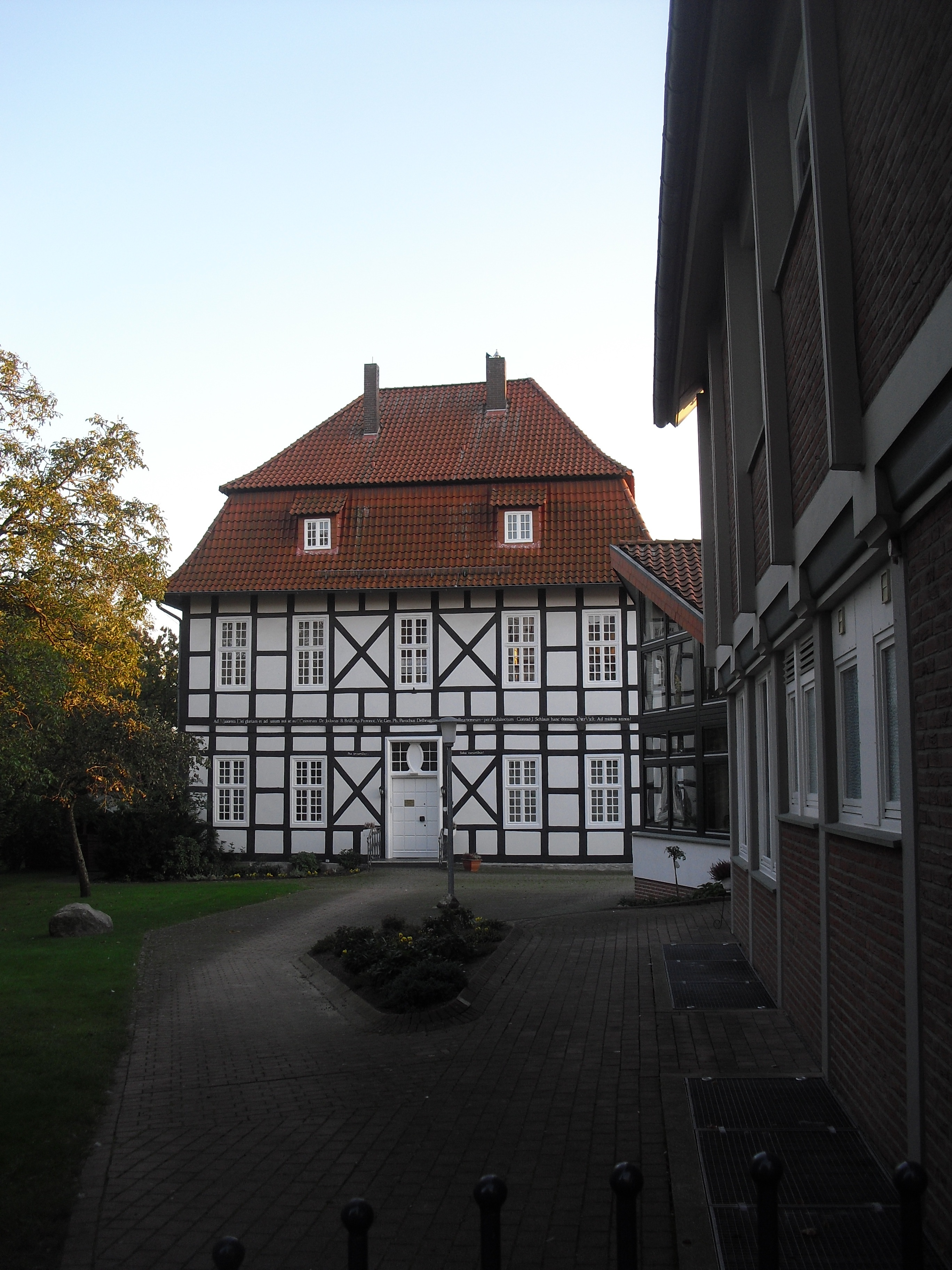 Pfarrhaus in Delbrück, Kirchplatz 11 This is a photograph of an architectural monument.